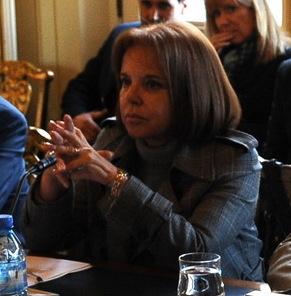 El ministro del Interior, Florencio Randazzo, junto a referentes políticos del interior en el Salón Norte de Casa Rosada.